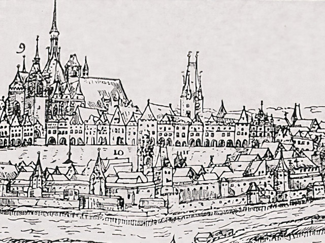 Břidlicová věž na Willenbergově vedutě Českých Budějovic, 1602